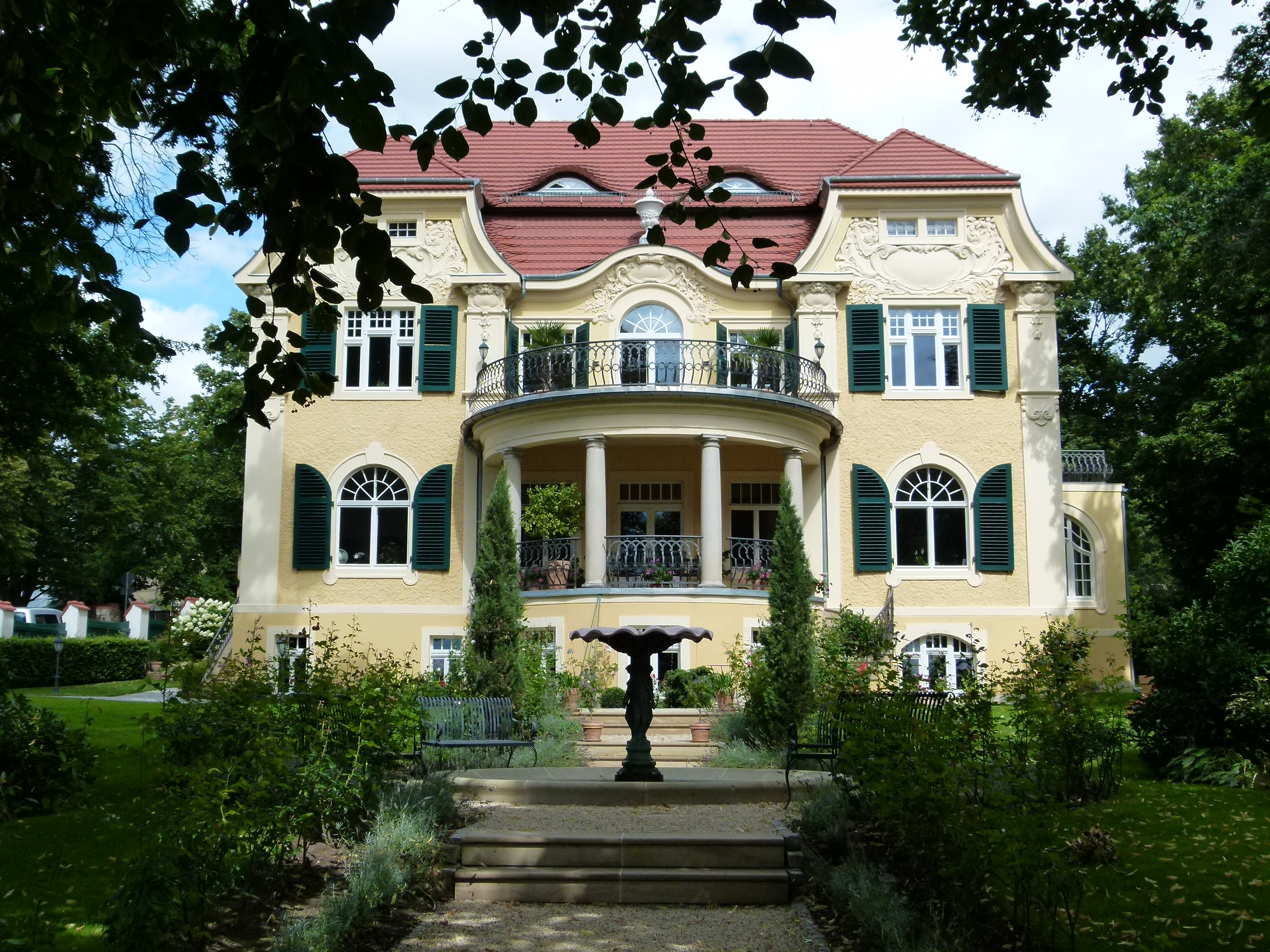 Denkmalgeschütztes Haus, Augustusweg 44, Radebeul, Sachsen